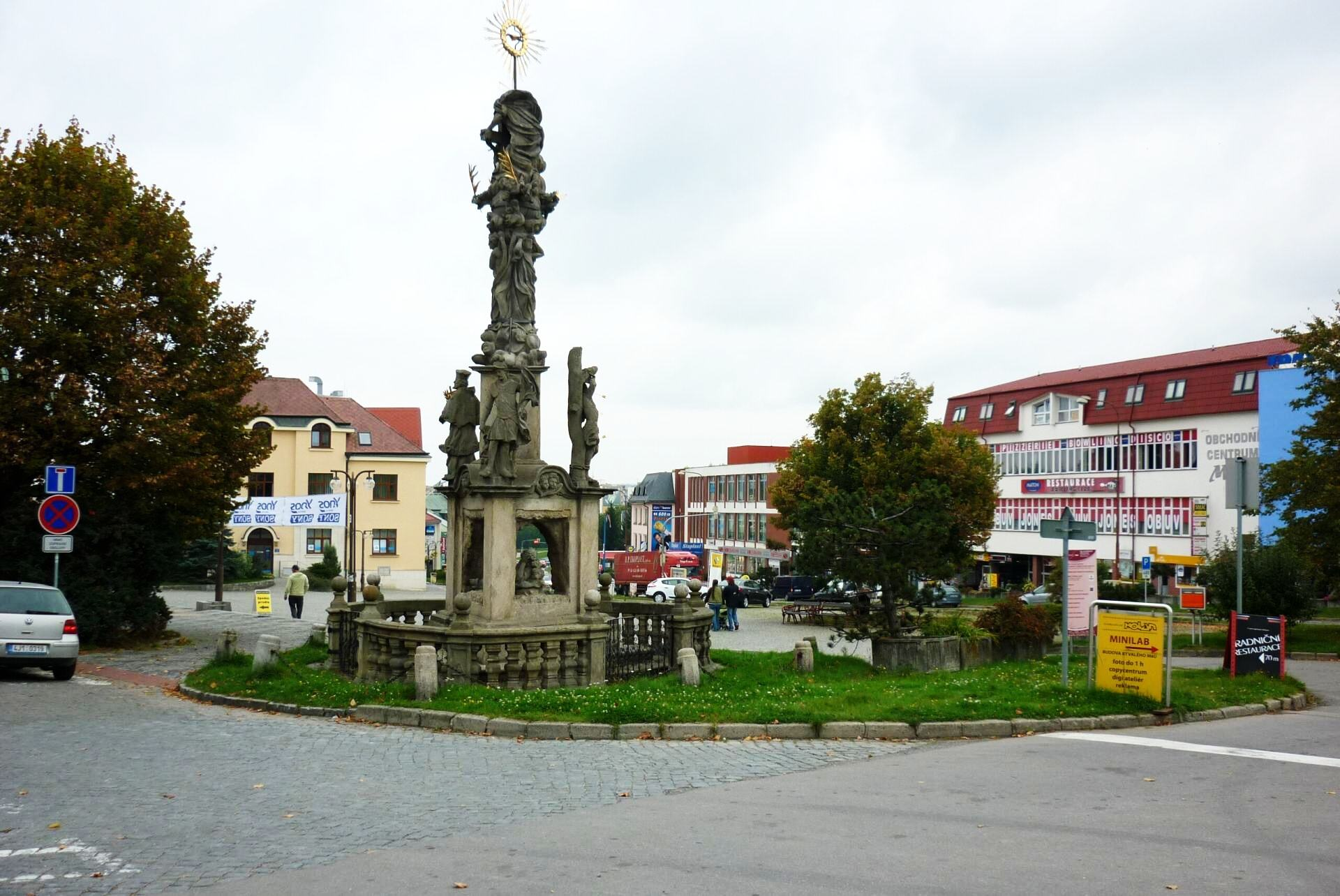 Náměstí ve Žďáru nad Sázavou